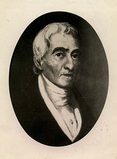 Retrato de Justo Pastor Lynch Galayn (1755-1830).